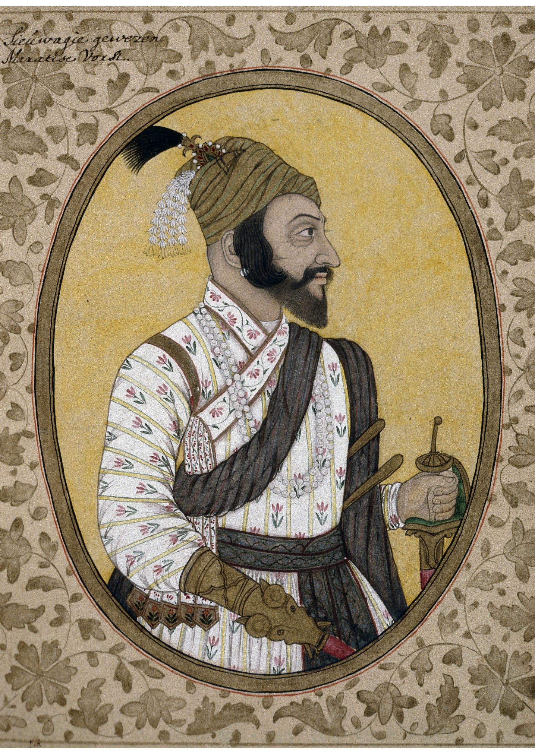 छत्रपती शिवाजी महाराजांचे हे चित्र लंडन इथल्या ब्रिटीश संग्रहालयातील आहे. Object types-painting Title (series)-Portraits of Indian Princes Materials-paper (all objects) Techniques-painted Production place-Made in Deccan ((Asia,India,Deccan) Place (findspot)-Found/Acquired Golconda (all objects) (Asia,South Asia,India,Deccan,Andhra Pradesh,Hyderabad District (India),Golconda) Period/Culture-Mughal dynasty